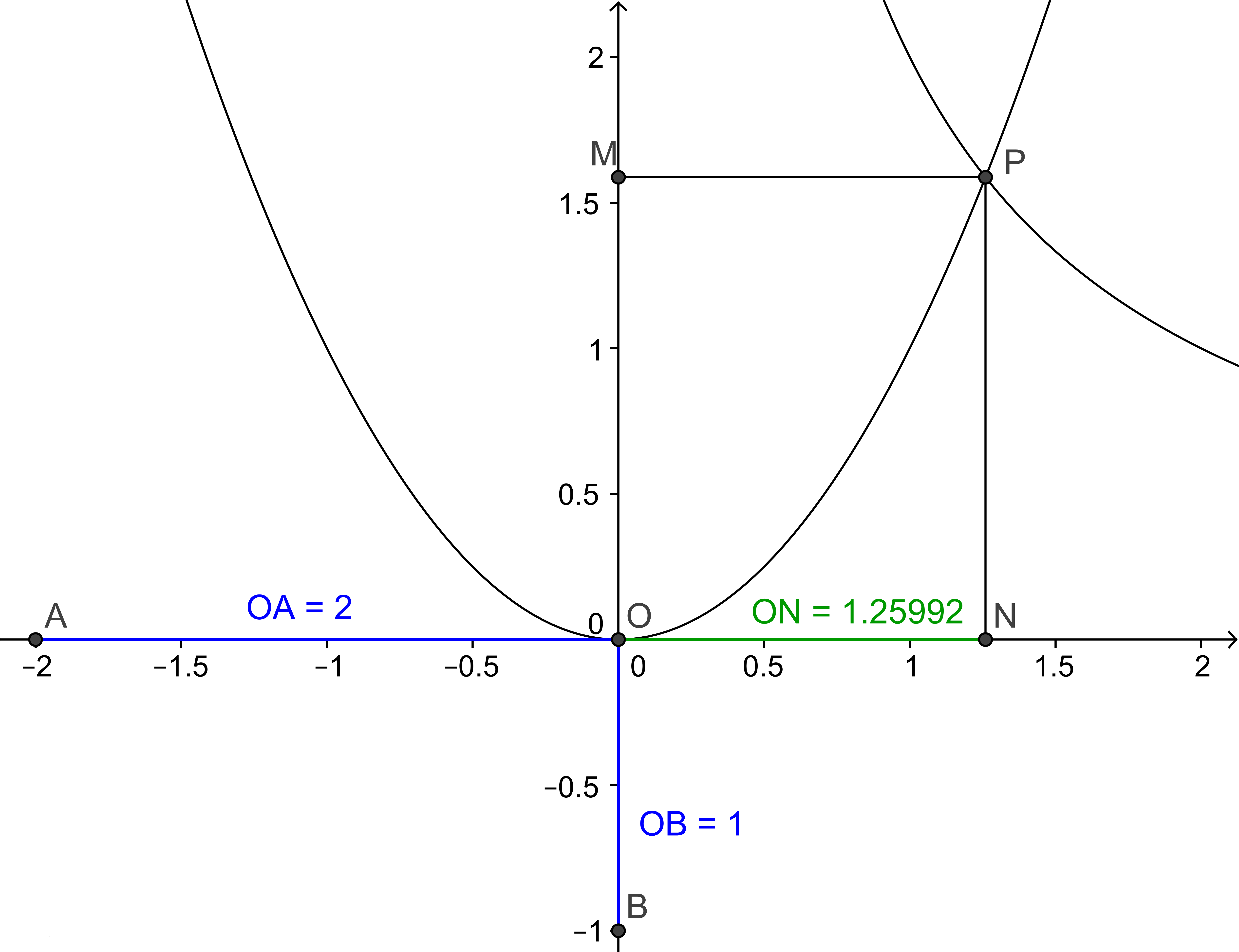 Duplicació del cub